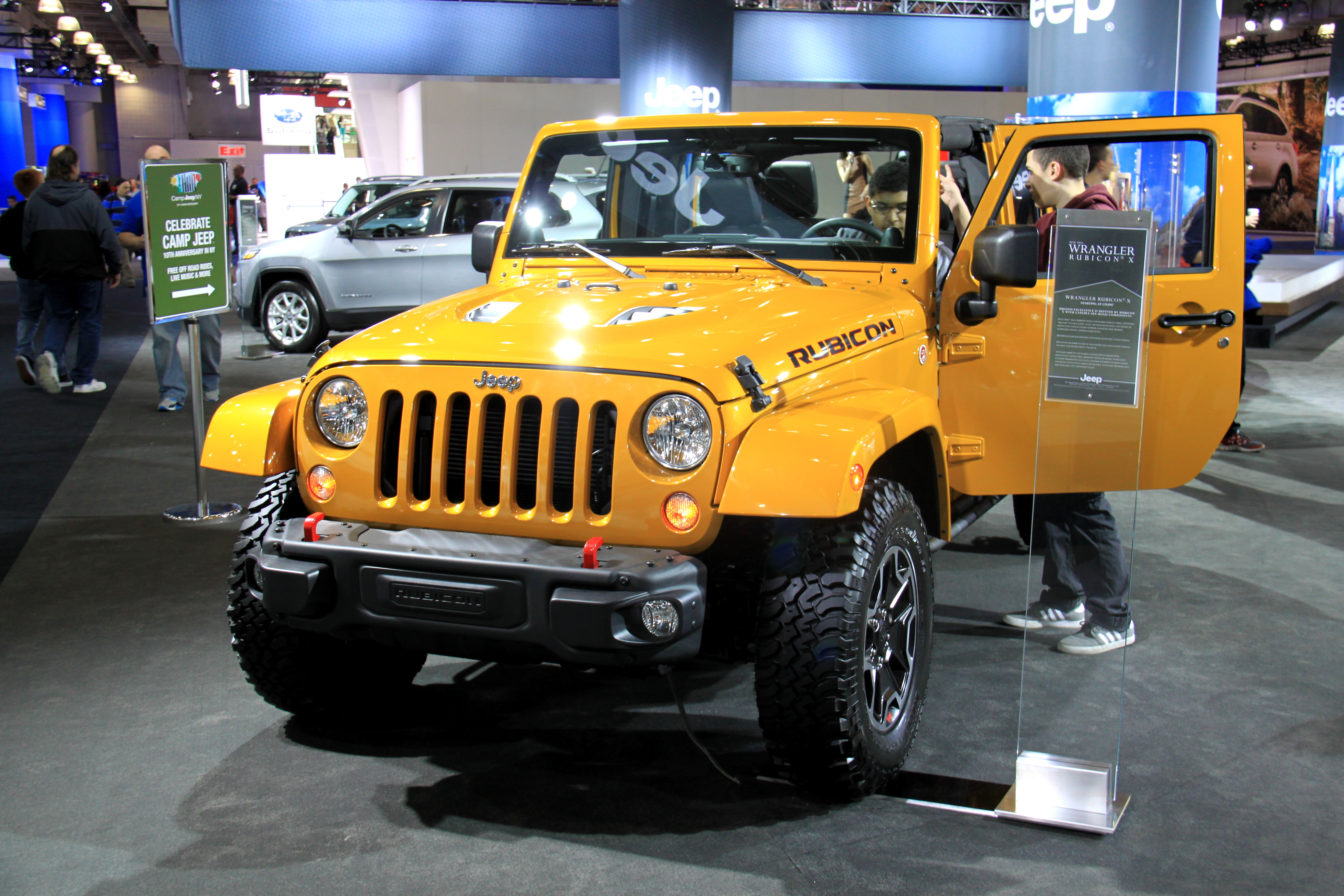 JEEP WRANGLER esposizione: Salone Internazionale dell'automobile di New York 2014